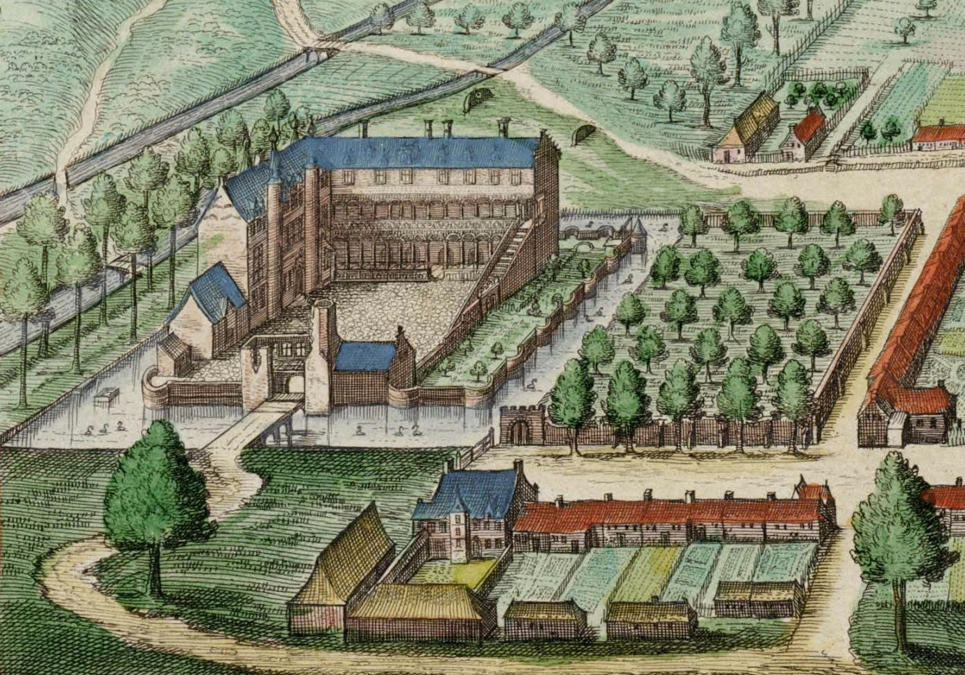 Het Egmontkasteel - stad Zottegem - Oost-Vlaanderen - België